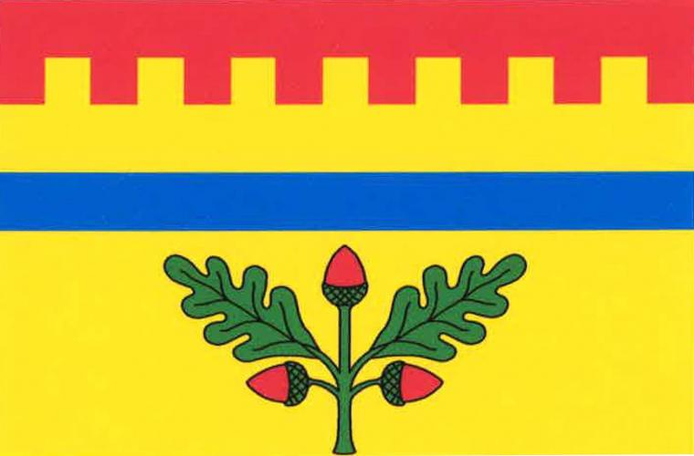 vlajka, Hradištko, okres Nymburk